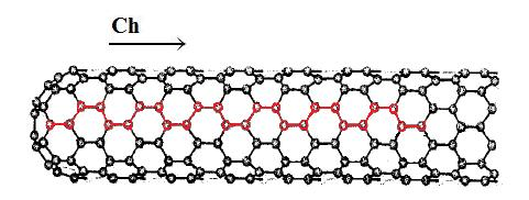 Image d'un nanotube de carbone monofeuillet de type «fauteuil»